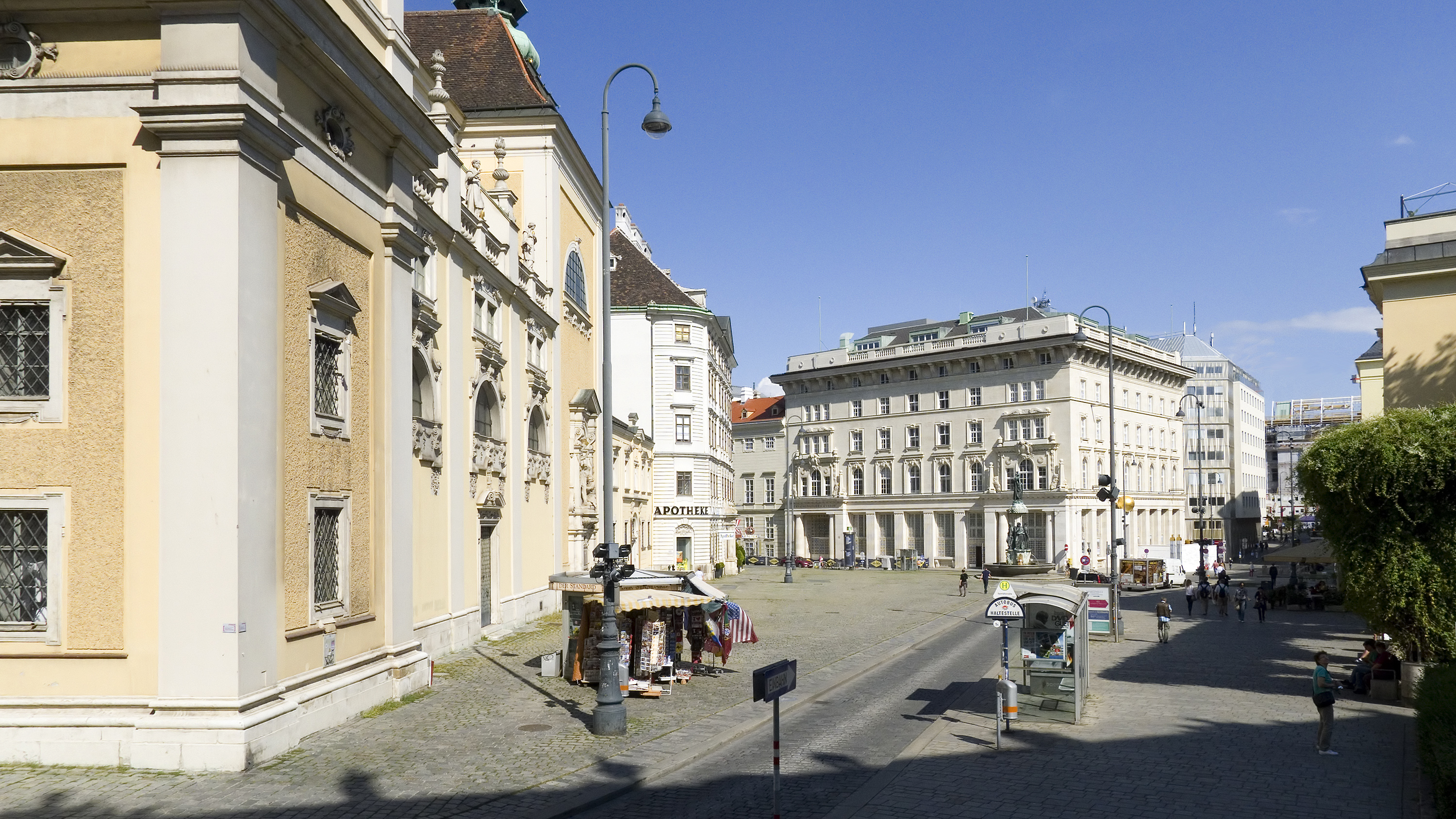 Freyung in Wien 1 bei der Teinfaltstraße Richtung Südosten